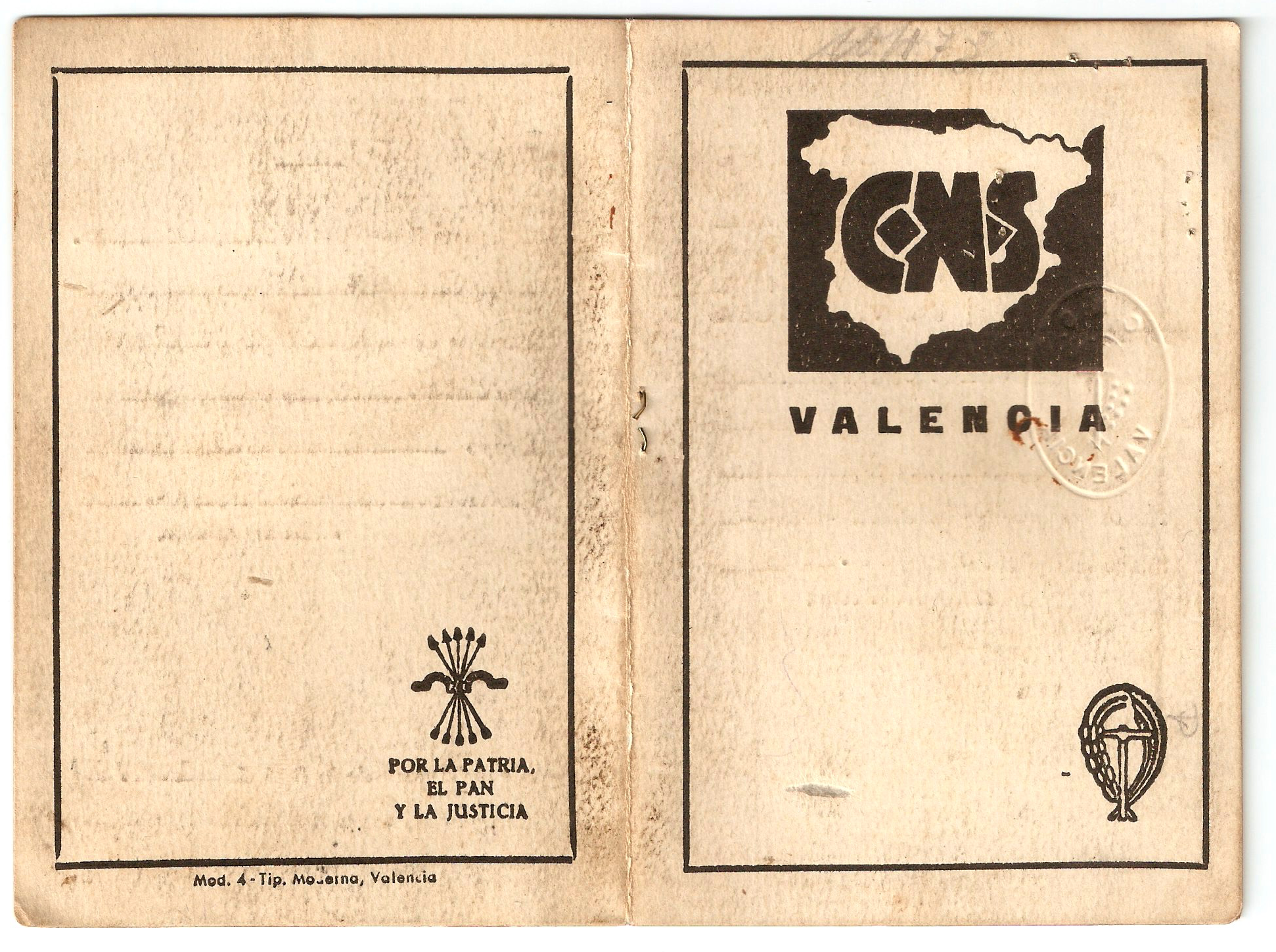 Carnet de la Central Nacional Sindicalista, más tarde llamada Organización Sindical, sindicato vertical de la etapa franquista.